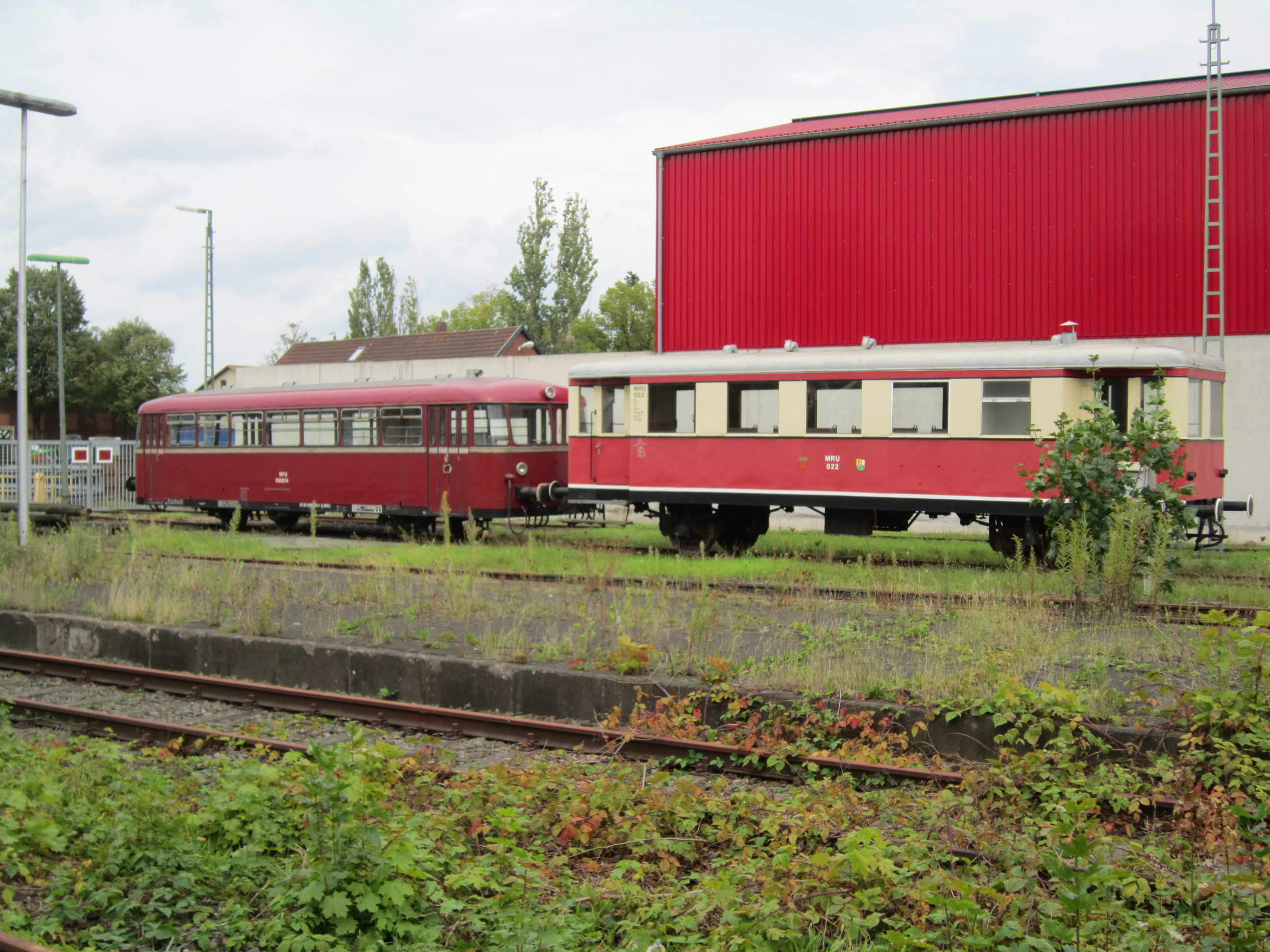 Fahrzeuge der Museumseisenbahn Rahden-Uchte im Bahnbetriebswerk Rahden